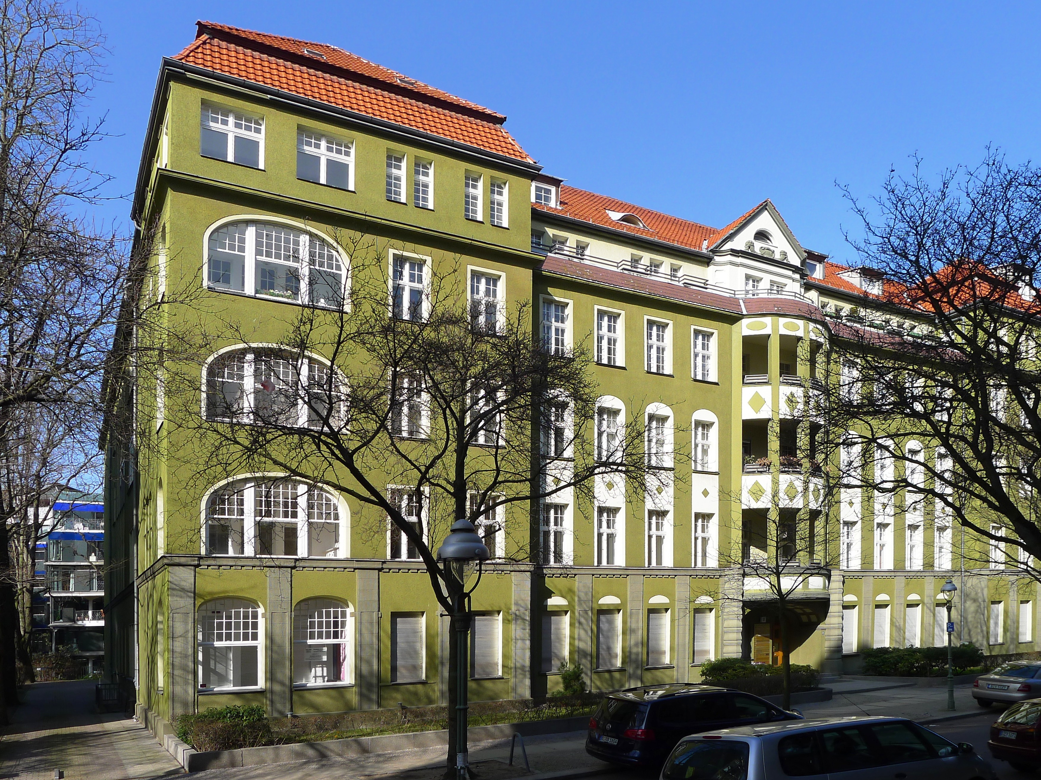 Mietshaus